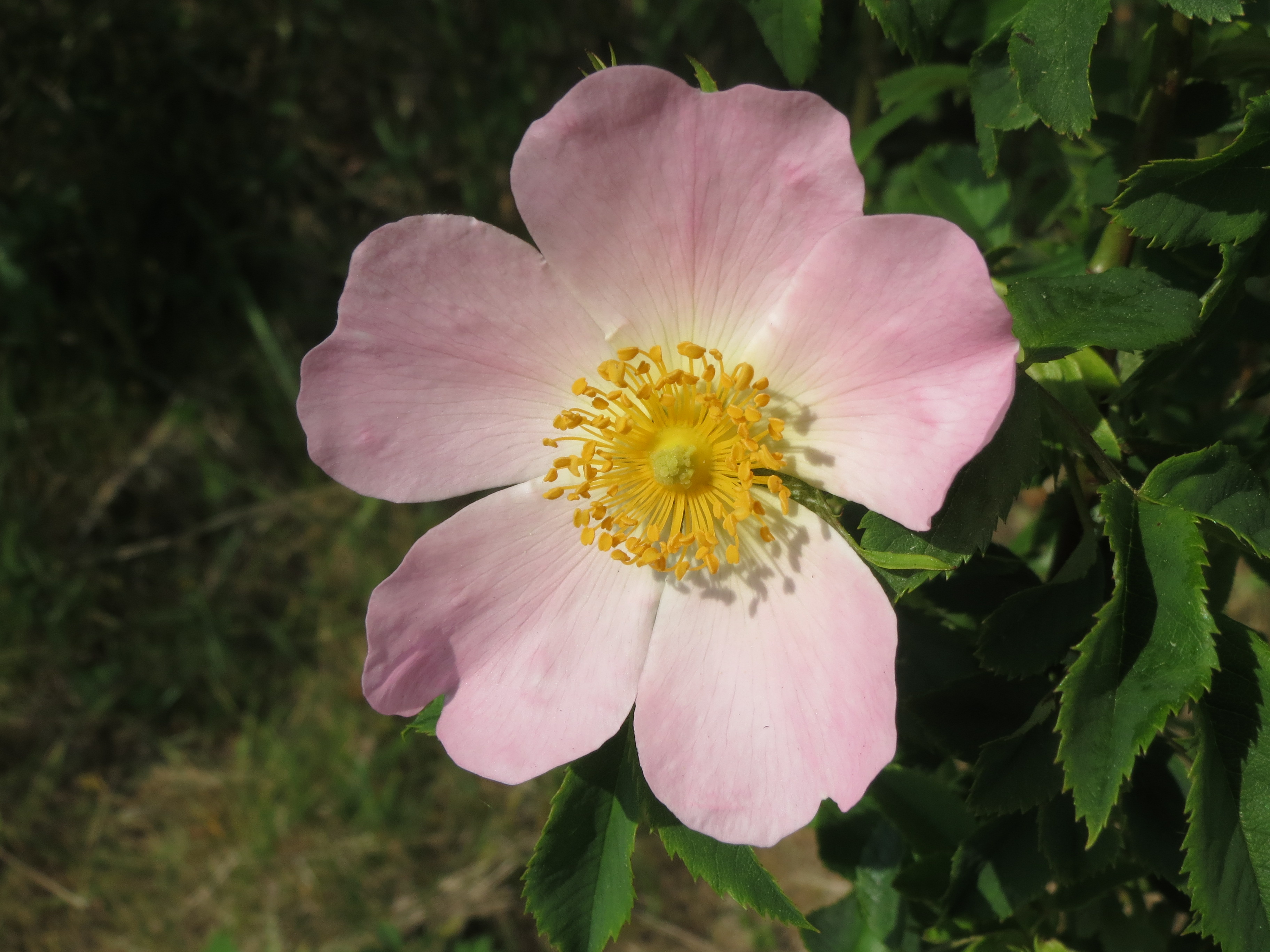 Hunds-Rose (Rosa canina) bei Reilingen